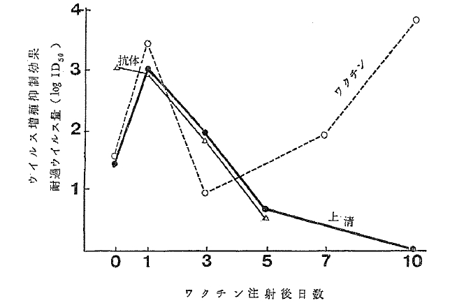 長野泰一-小島保彦の実験[1-4]。長野泰一,小島保彦らは、1940年代から、生体において抗ウイルス免疫が発現する正確な時期を知ろうとして精密な実験を重ねた[2]｡ 本図の実験[4]は、以下の３群のウサギ（同一種類）Ａ，Ｂ，Ｃにそれぞれ、以下の投与を行った（恐らく皮下注射）後、ウイルス抵抗性を調べたものである。実験が意味をなすためには、Ａ，Ｂ，Ｃのいずれのウサギもワクシニアウイルスへの感染履歴がないことが前提となる。 Ａ群：粗ワクチン（ウサギのワクシニアウイルス感染組織のホモジェネートに紫外線を当て、ウイルスを不活化たものであり、動物組織成分と不活性ウイルスとの混合物） Ｂ群：上記の粗ワクチンの遠心上澄（抗ワクシニアウイルス、エピトープ共に含まれていない液性分画）。 Ｃ群：精製された抗ワクシニアウイルス抗体。 実験の結果以下のことが判った。 粗ワクチンを投与した群（実線、上記のＡ群）の効果のピークは注射後1日目と10日以降の二個ある。 ワクチンの遠心上清を投与した群（破線のＢ群）の効果のピークは1日目のみである。 粗ワクチンにおいて、遅い方のピークは通常の免疫効果と考えられるが､早期のピークは非免疫性の効果と考えられる（1957年)[3]。早期のピークの因子はウイルス抗原でもなく､抗ウイルス抗体でもない事が重ねて証明された(1958年)[4]。本因子は後にインターフェロンと呼ばれることになる。 [1]日本学士院賞受賞理由[1],[2] [2] 長野泰一,後藤寿作,原東太郎「種痘免疫発現時期二関スル実験的研究」第一五回連合微生物学会記録,P142 (1941) [3]Y. Nagano, Y Kojima, Compt.Rend.Soc.Bio1 148, P1700(1954). 英訳（京都大学 渡辺好彦氏による）[3] 和訳（京都大学 渡辺好彦氏による）[4] 解説（京都大学 渡辺好彦氏による）[5] [4]Y. Nagano, Y Kojima, Compt.Rend.Soc.Bio1.,152,1627,(1958) 英訳（京都大学 渡辺好彦氏による）[6] 和訳（京都大学 渡辺好彦氏による）[7]